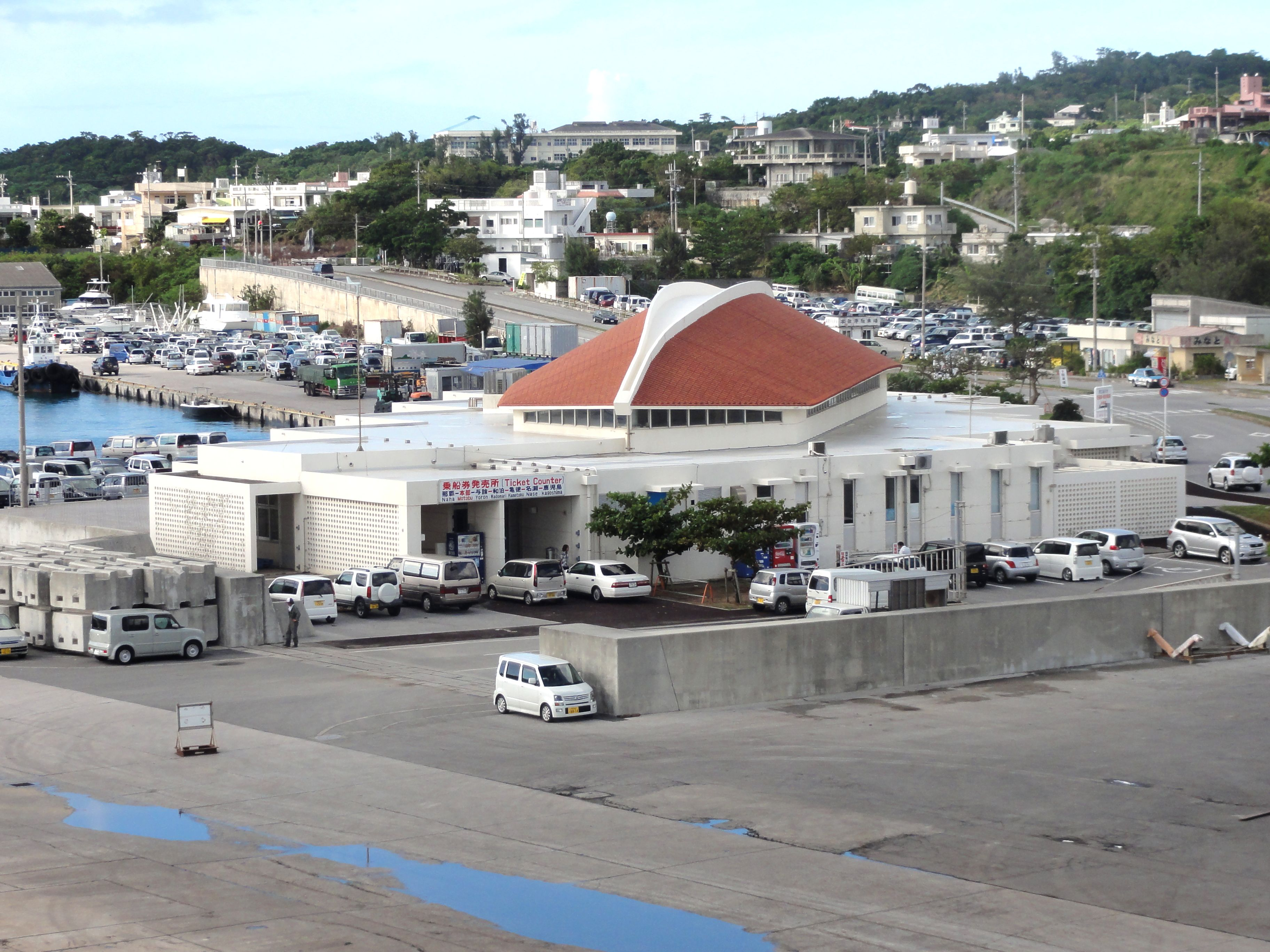 本部港フェリーターミナル